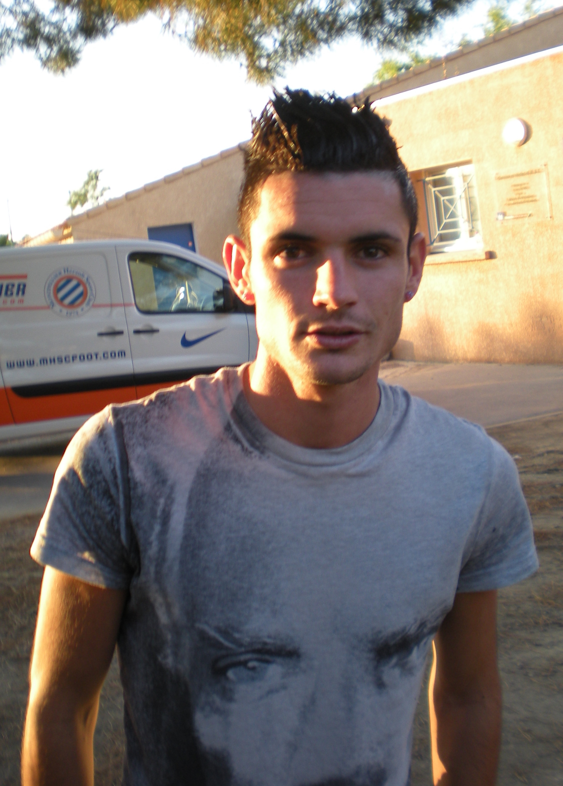 Rémi Cabella, Juillet 2012.